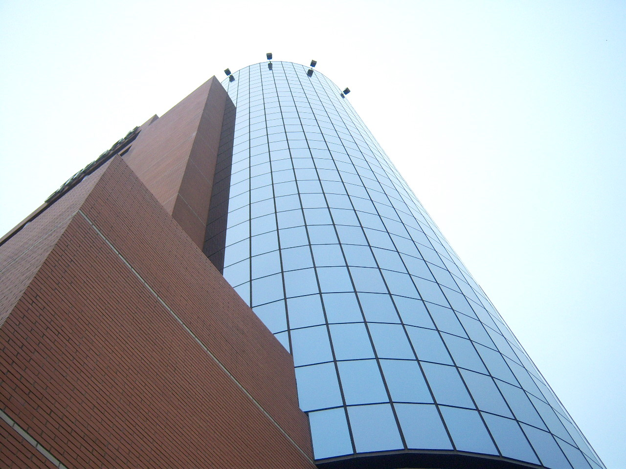 Edificio central del Citi en Paraguay.